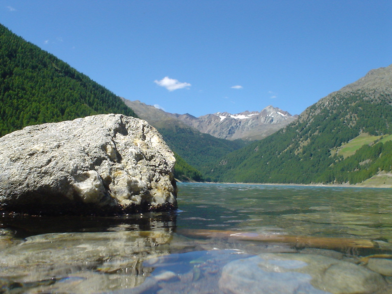 Vernagtstausee im Schnalstal (Südtirol). Blickrichtung Kurzas nebst Gletscher, im Hintergrund Saldurkopf und Lagaunspitze (rechts) über dem Lagaunferner